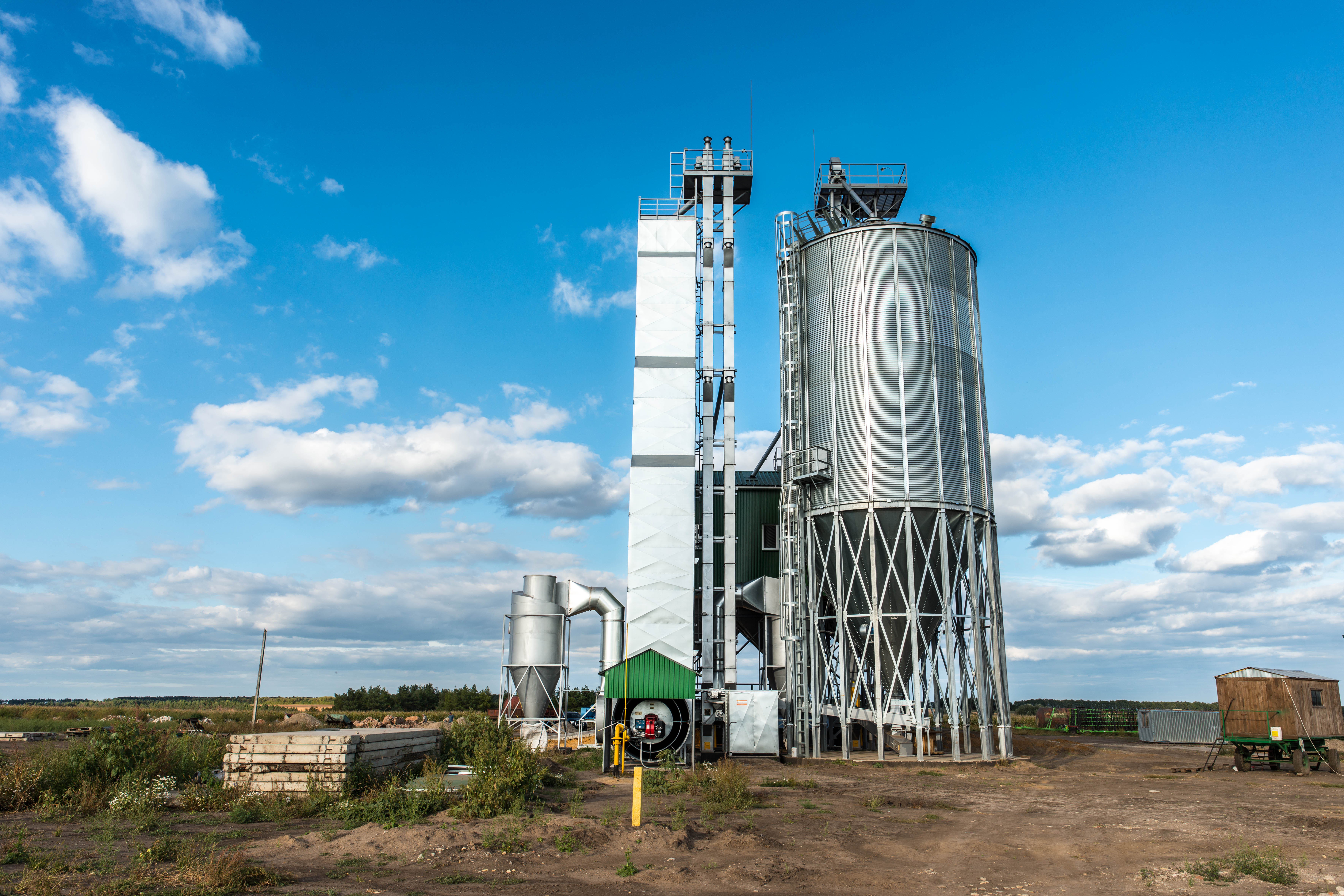 Шахтная зерносушилка "Агропромтехника"